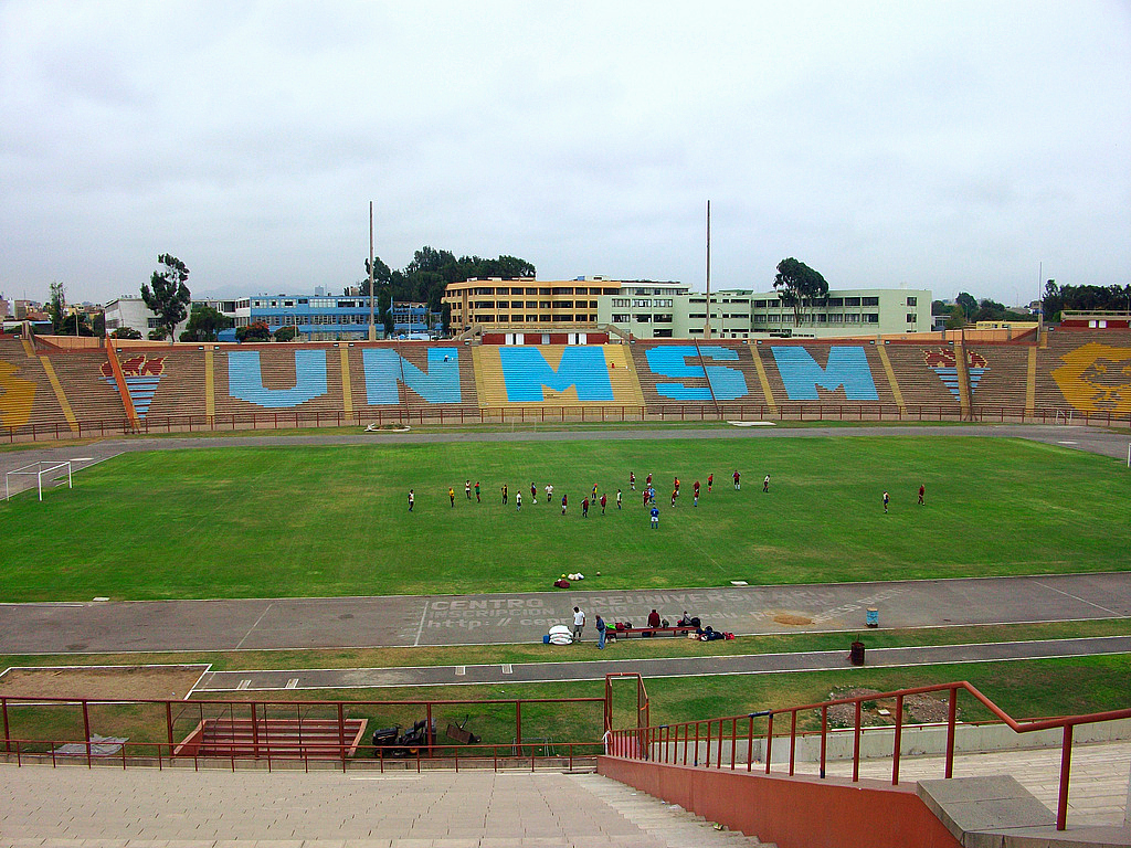 Estadio Monumental de la Universidad Nacional Mayor de San Marcos (Lima, Peru)